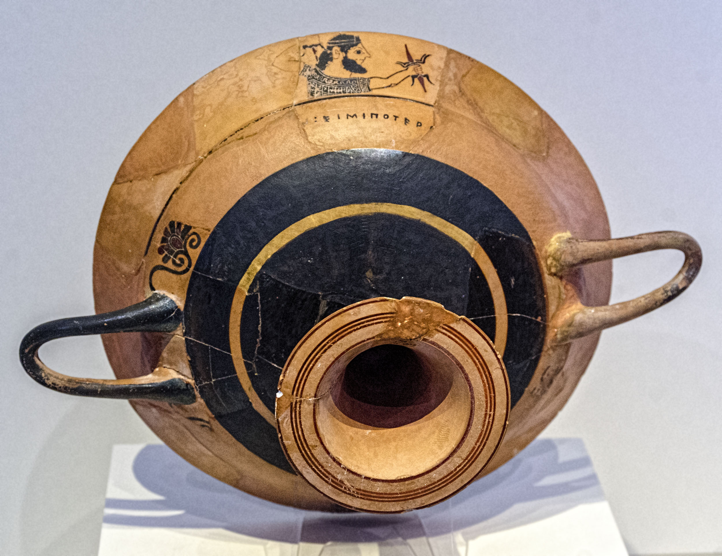 Un kylix o kilix es una copa de la cerámica griega clásica, poco profunda y con dos asas sobre un pie. Este se encontró en el Cerro del Castillo (Medellín, Badajoz). Parece haber sido importada de Grecia ya que lleva impreso el taller de Eucheiros, donde se fabricó. Está datado en el siglo VI a.C.